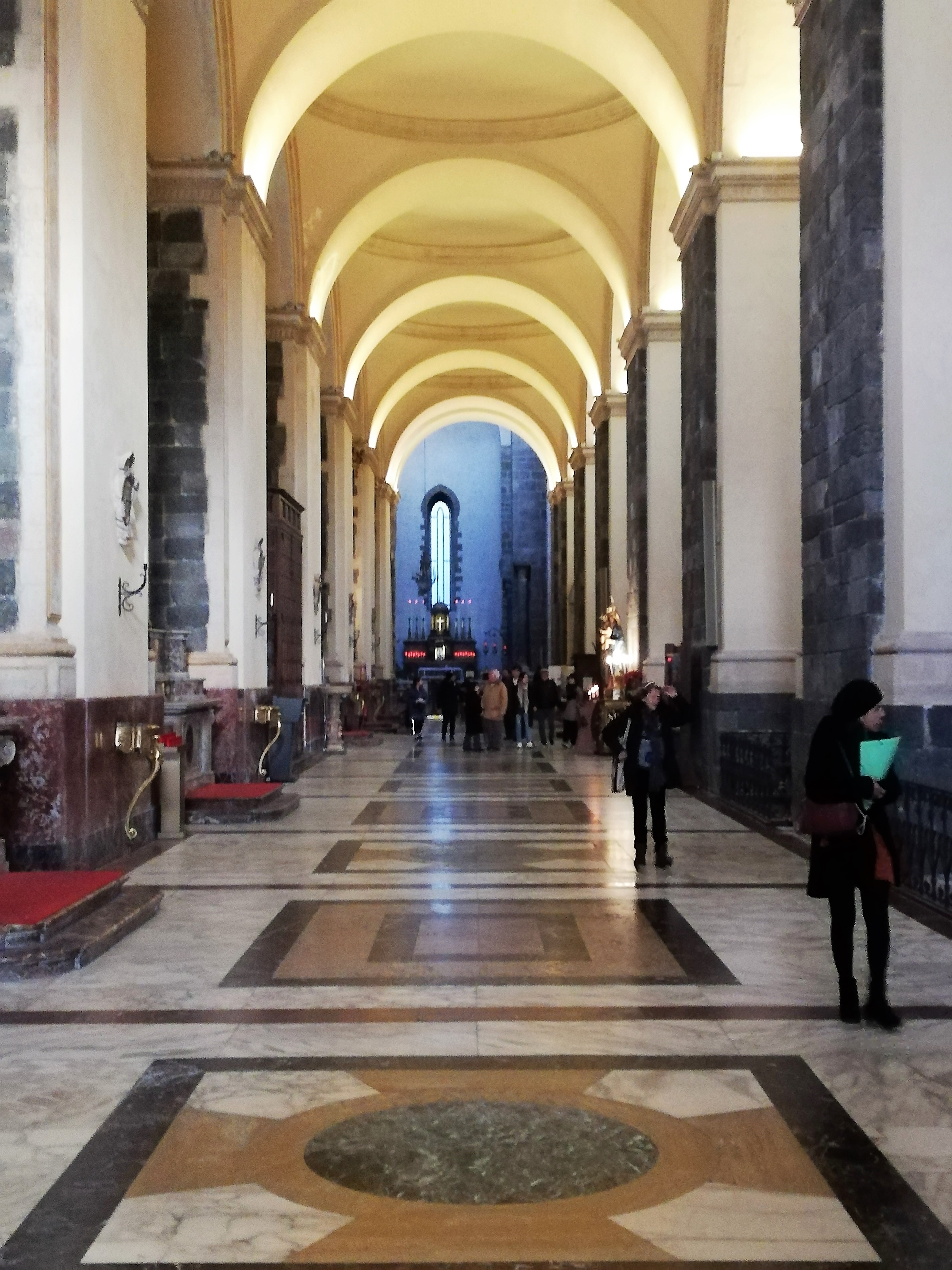 Prospettiva navata sinistra.